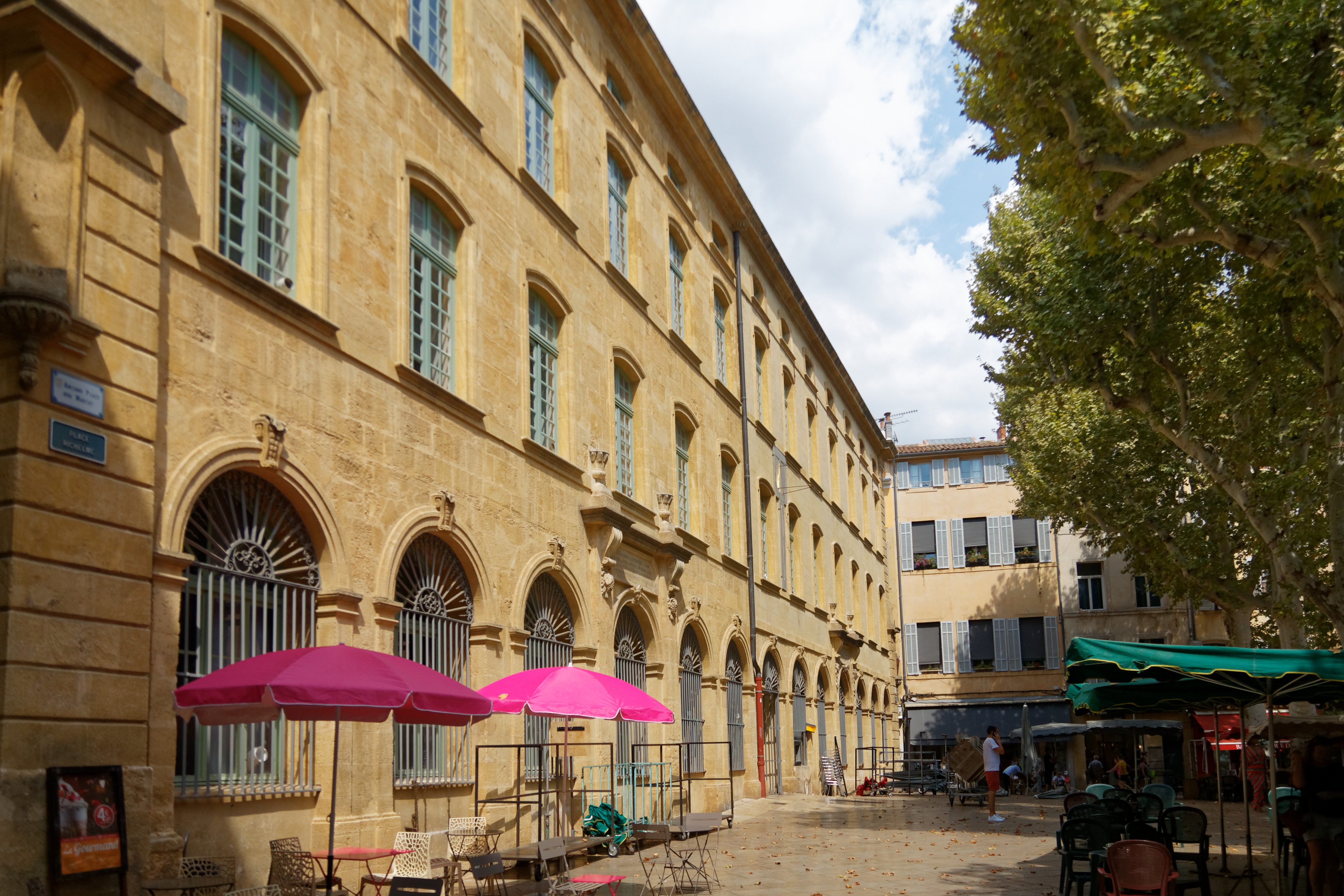 Halle aux grains in Aix-en-Provence, Südseite